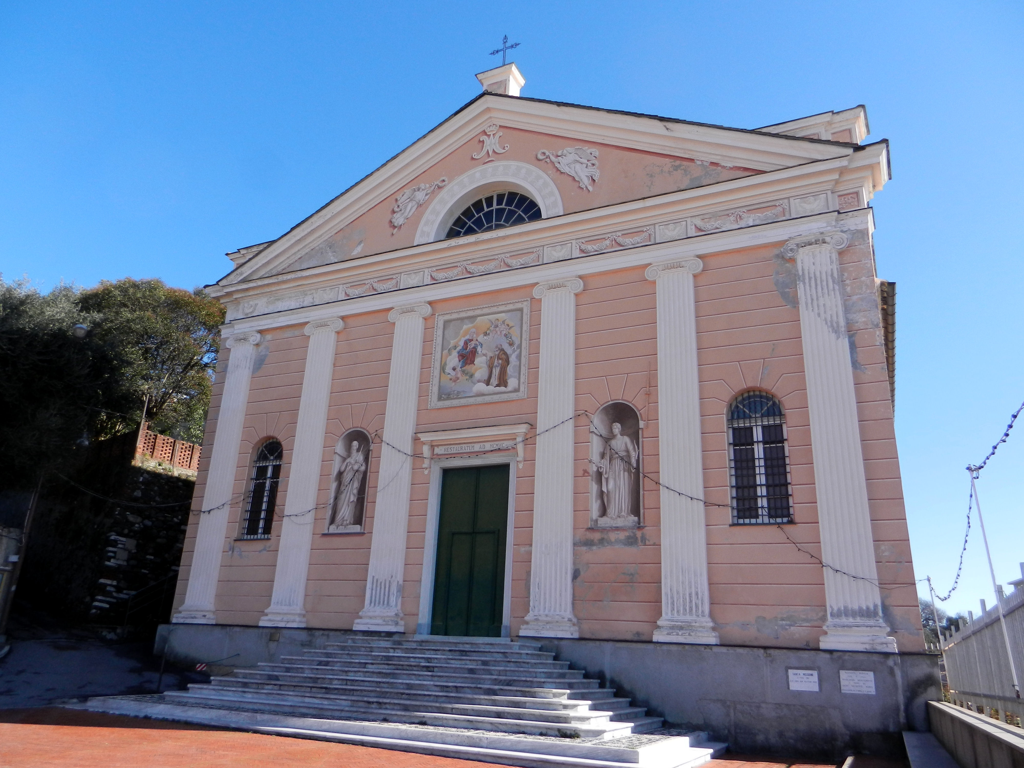 Genova Multedo, la chiesa di S. Maria di Monte Oliveto